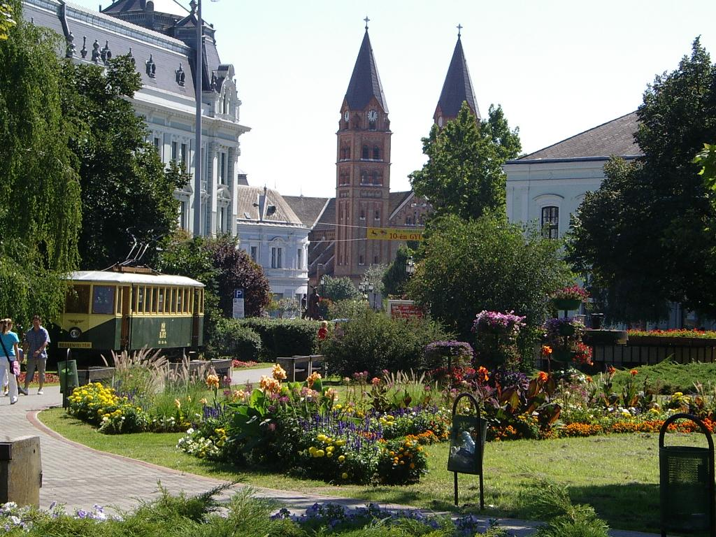 Nyíregyháza belvárosa, saját kép.